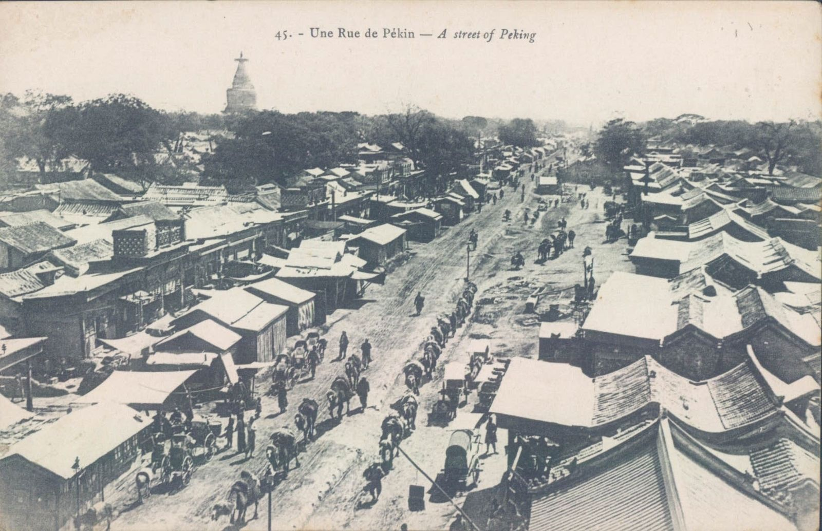 法文标题为北京某条街。实际上图左上角是妙应寺白塔，此街应为阜成门内大街。照片拍摄位置比较高，结合当时的条件，可以探测是在阜成门城楼上拍摄。